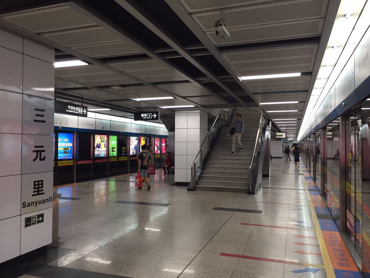 广州地铁三元里站